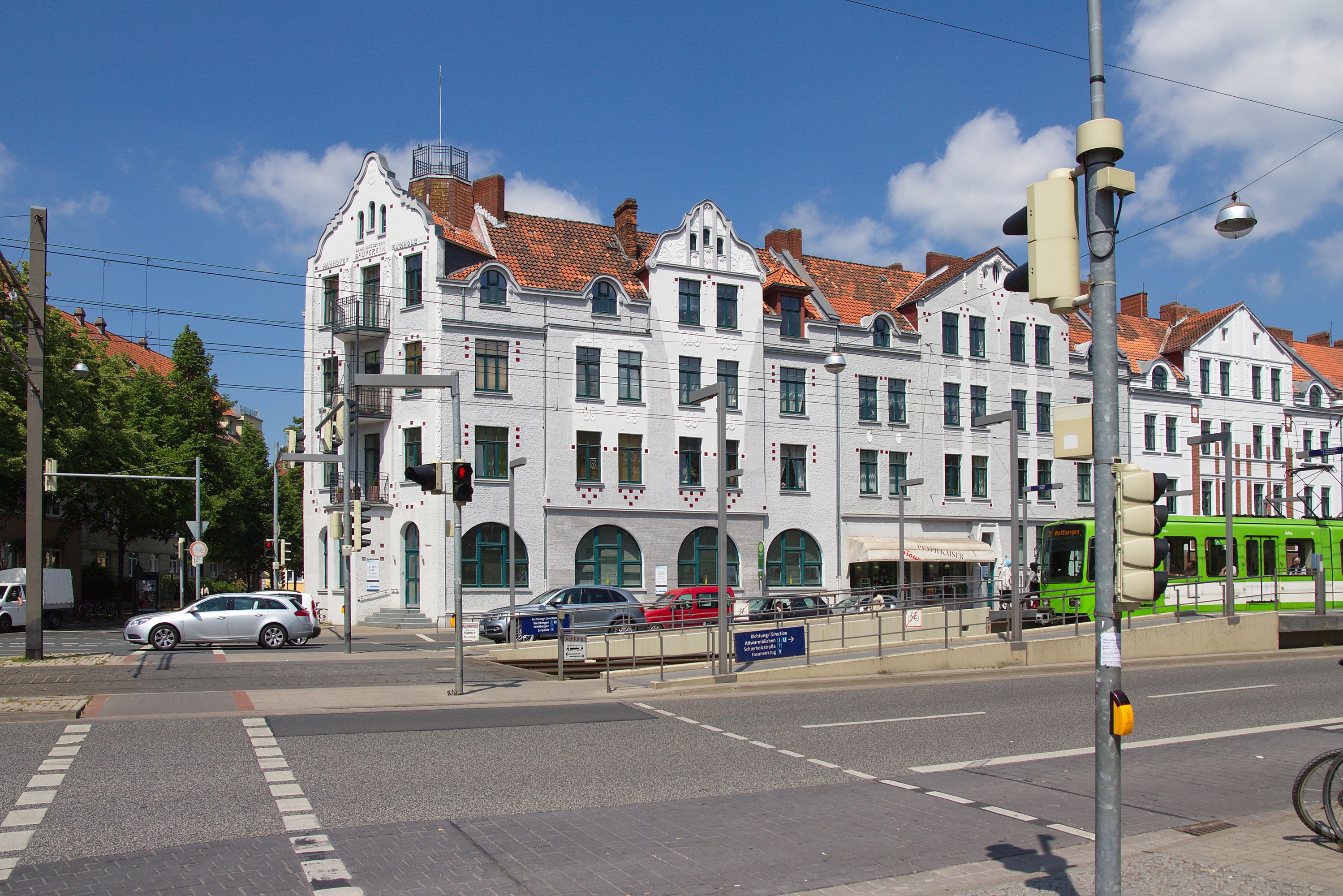 Spannhagengarten-Podbielskistraße (Hannover), Niedersachsen, Deutschland.